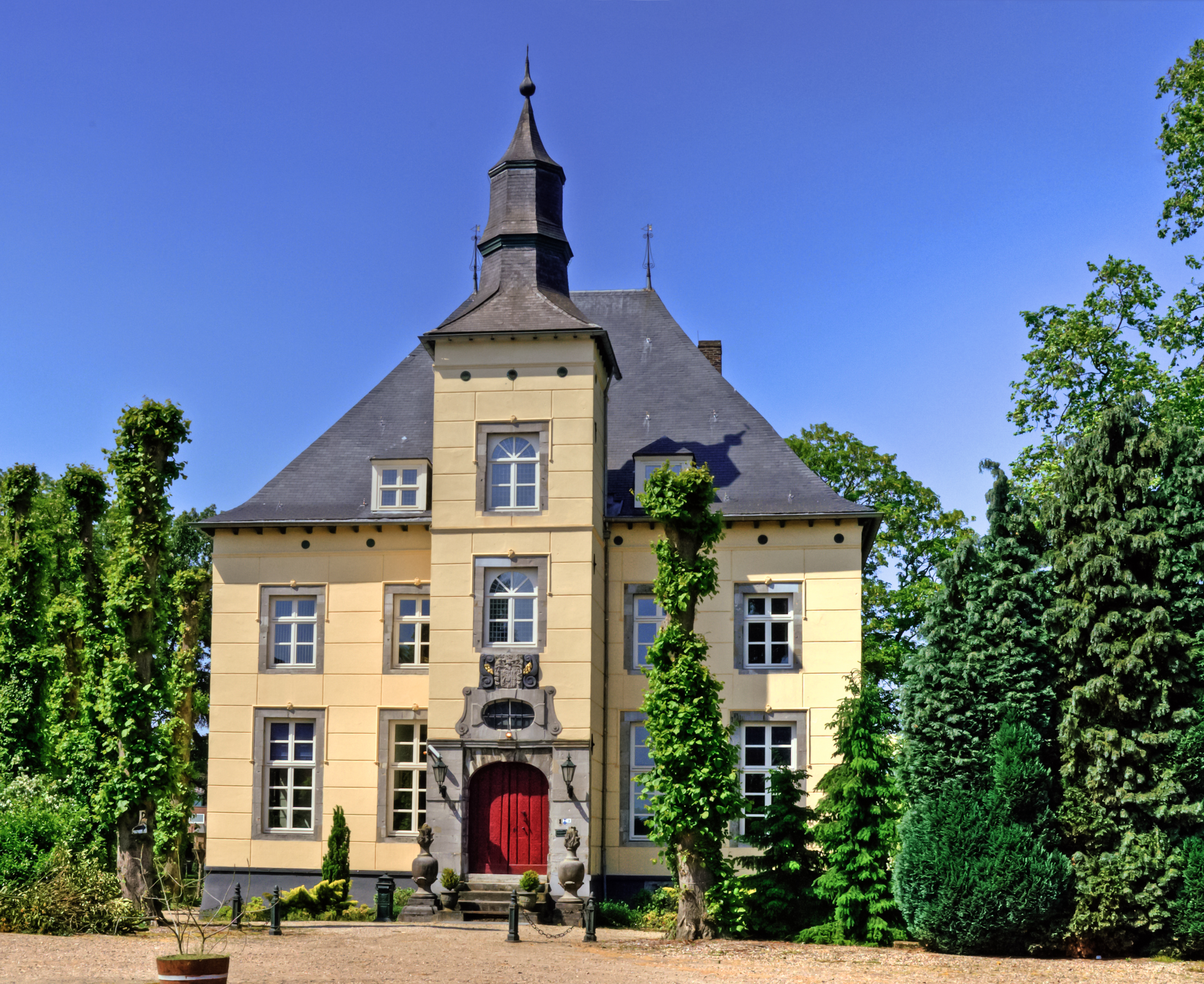 Kasteel Het Steenen Huys in Vlodrop (Limburg, Nederland)